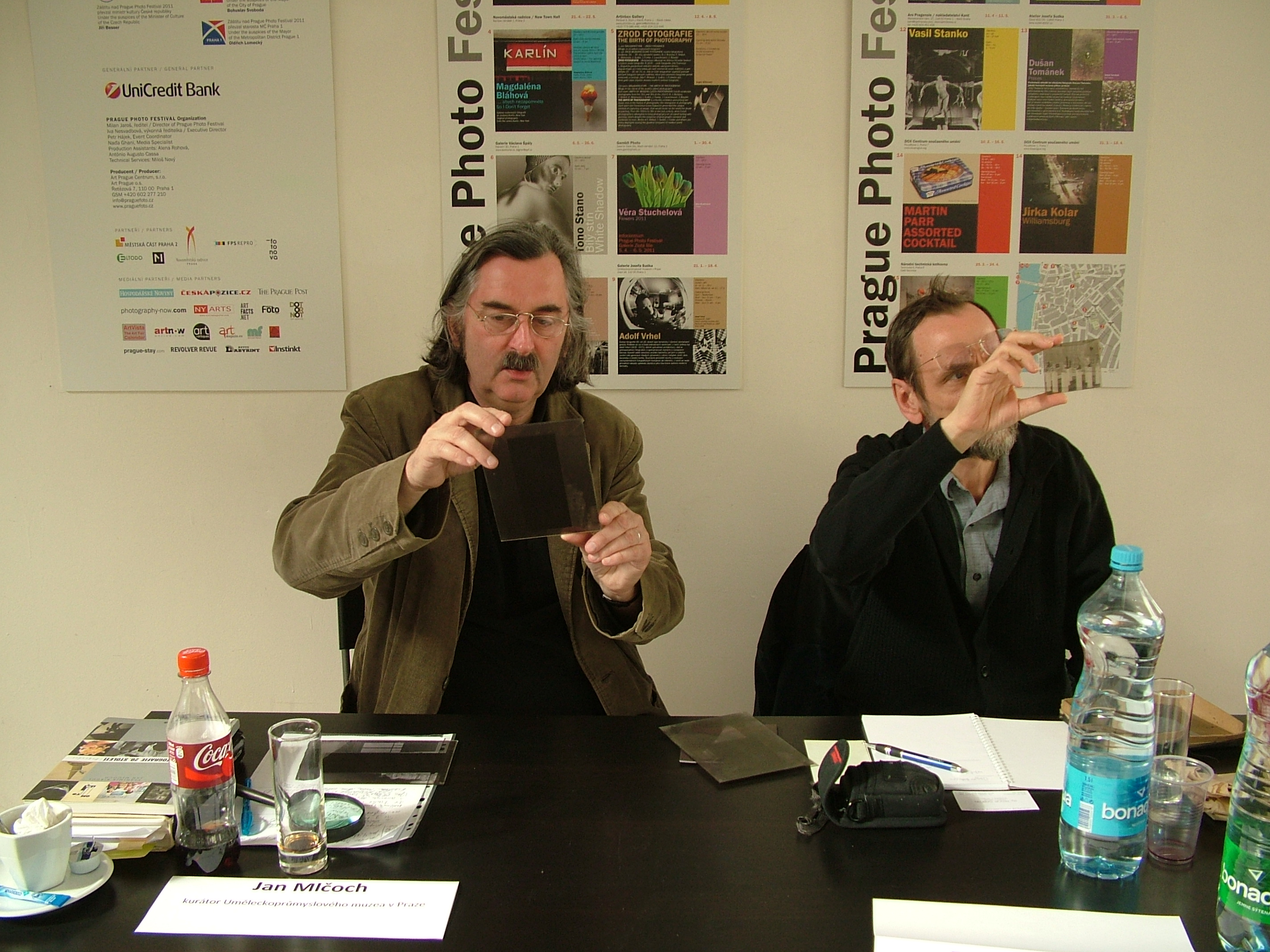 Výstava, festival, Prague Photo 2011 Budova: Mánes, Praha Trvání: od 4. dubna do 10. dubna 2011. Datum: 10. dubna 2011.